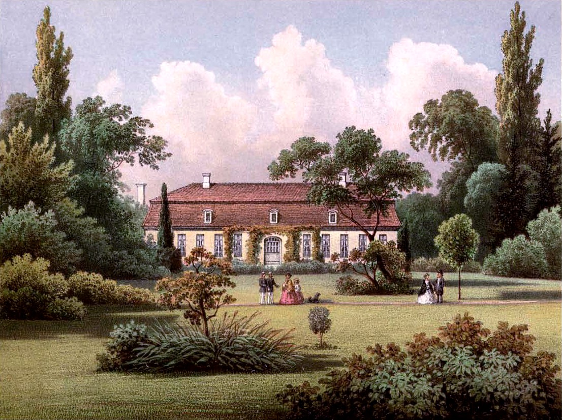 Rittergut Göritz, Kreis Prenzlau, Lithografie aus dem 19. Jahrhundert